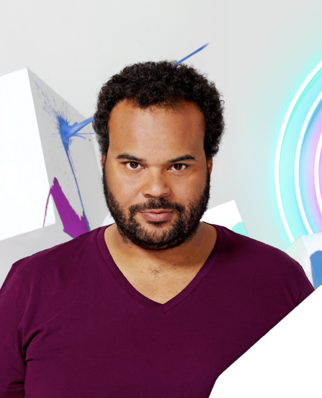 Foto promo Artista Carlos Jean